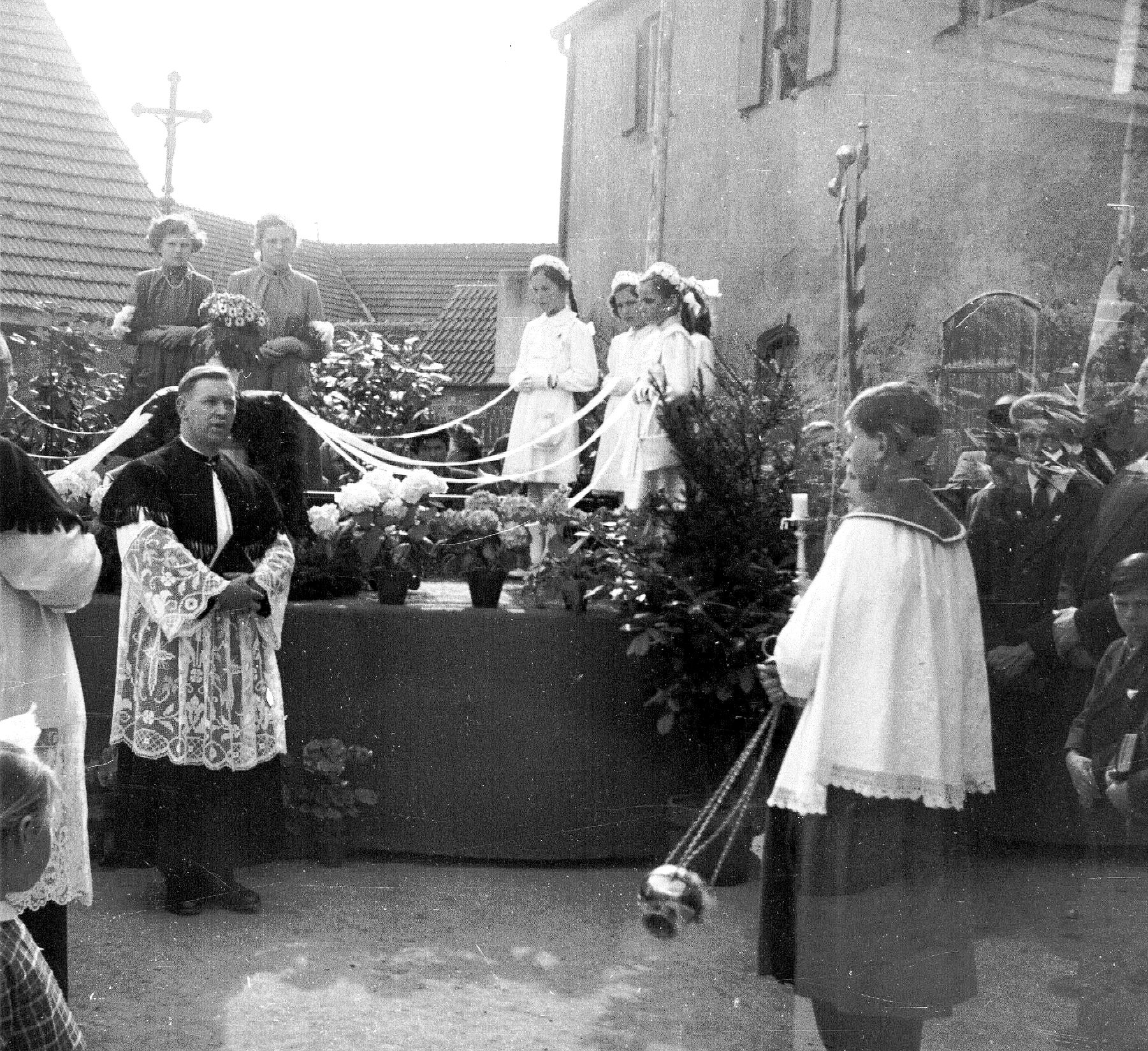 Glockenweihe, im Vordergrund Ortspfarrer Georg Reiner. Weihe der Glocke Anton und Maria, gestiftet durch Vonficht.